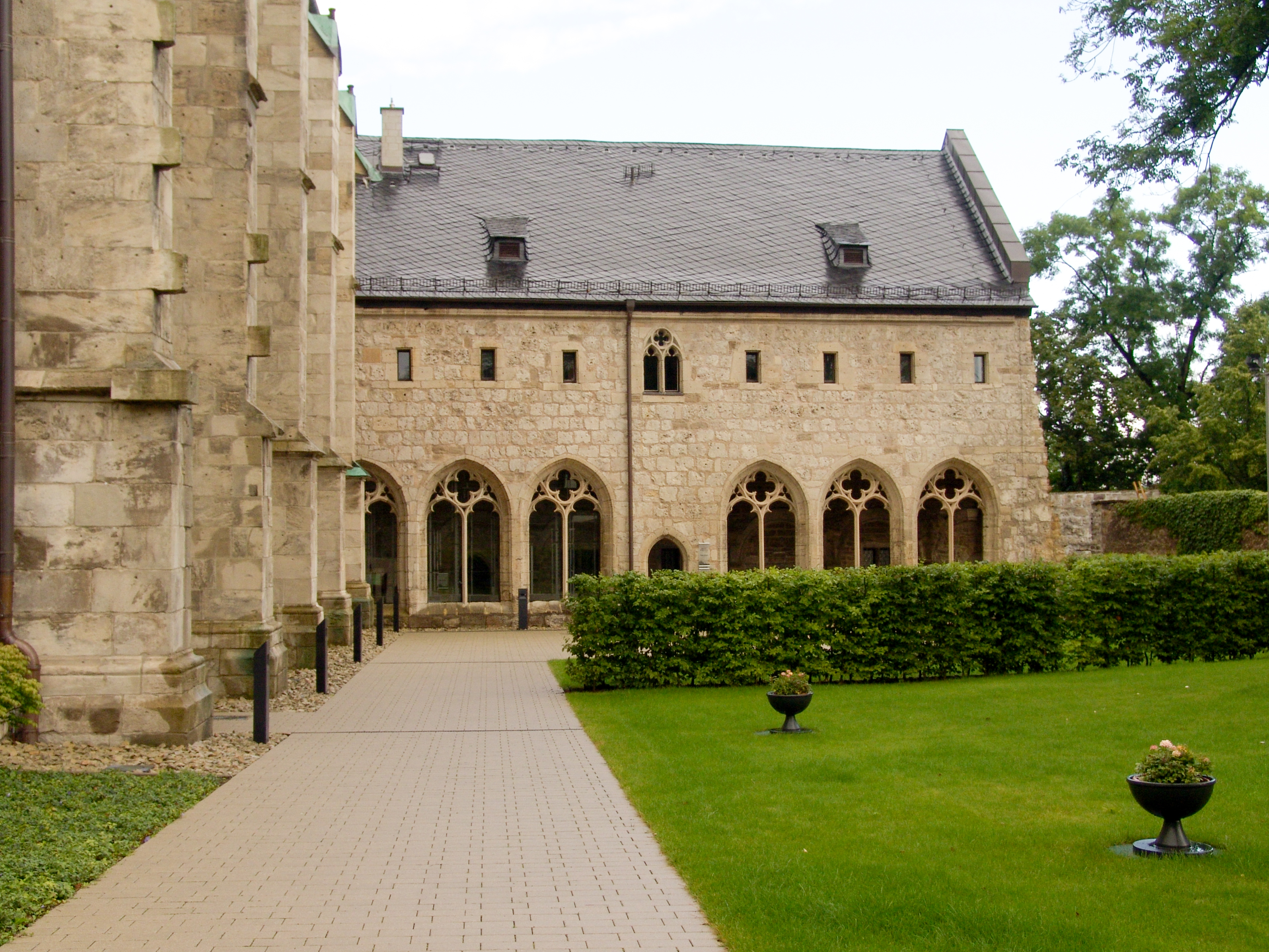 Nordhausen, Dom, Außenbereich